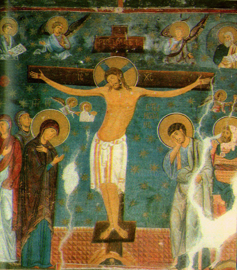 Medieval fresco from Studenica monastery